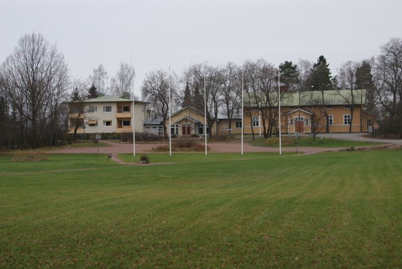 Valokuva Lapinjärven kunnantalosta.